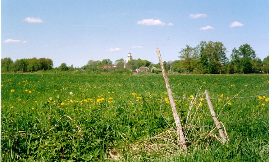 Mörlunda kyrka och slätten däromkring, fotot är taget omkring år 2000, av Harri Blomberg.